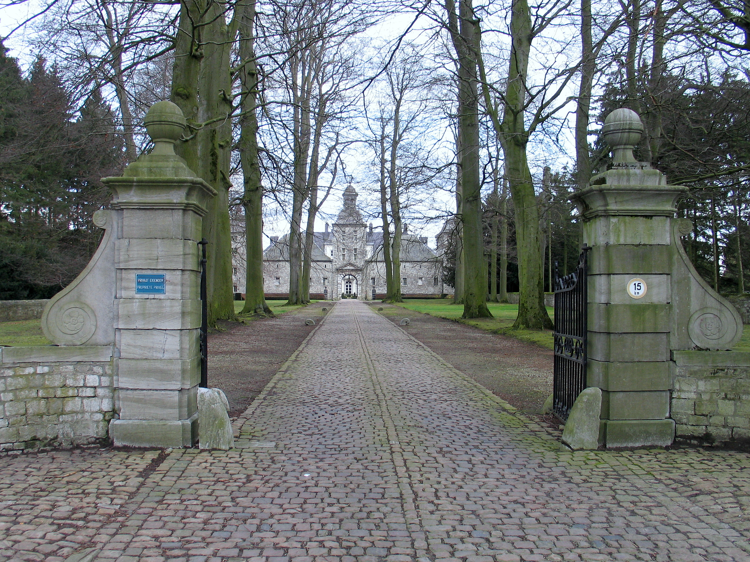 Kasteel van Warfusée - eigen werk - onder GFDL en cc-by-sa